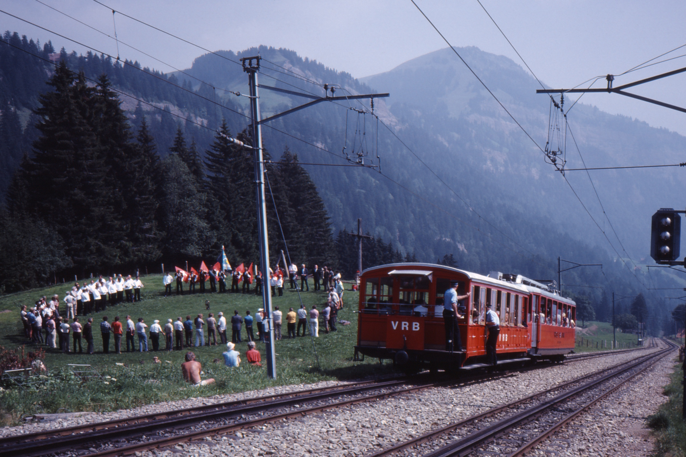 VRB Train to Vitznau at Kaltbad